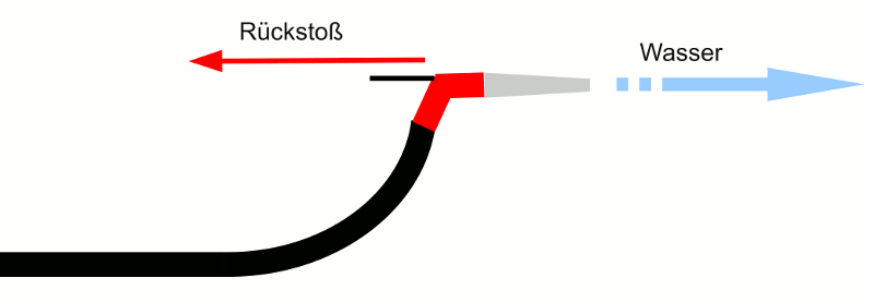 Zur Wirkungsweise eines Stützkrümmers: Der Druck des nach vorn strömenden Wassers möchte den nach oben gekrümmten Schlauch gerade biegen; der Rückstoß drückt das Schlauchende jedoch nach hinten, stabilisiert also auf die Weise die Krümmung des Schlauchs. Andererseits kann der Rückstoß das Schlauchende nicht beliebig weit bewegen, da die Rückwärtsbewegung durch die Steifheit des wassergefüllten Schlauchs gestoppt wird. Die durch den Rückstoß ausgeübte Kraft wird dann durch den gekrümmten Schlauch umgeleitet, in den Boden.